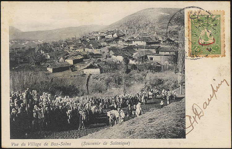 Село Долно Сълне в началото на 20 век.